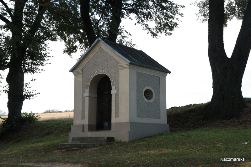 Góra Świętej Anny, kaplica Pożegnanie, 1756-1764